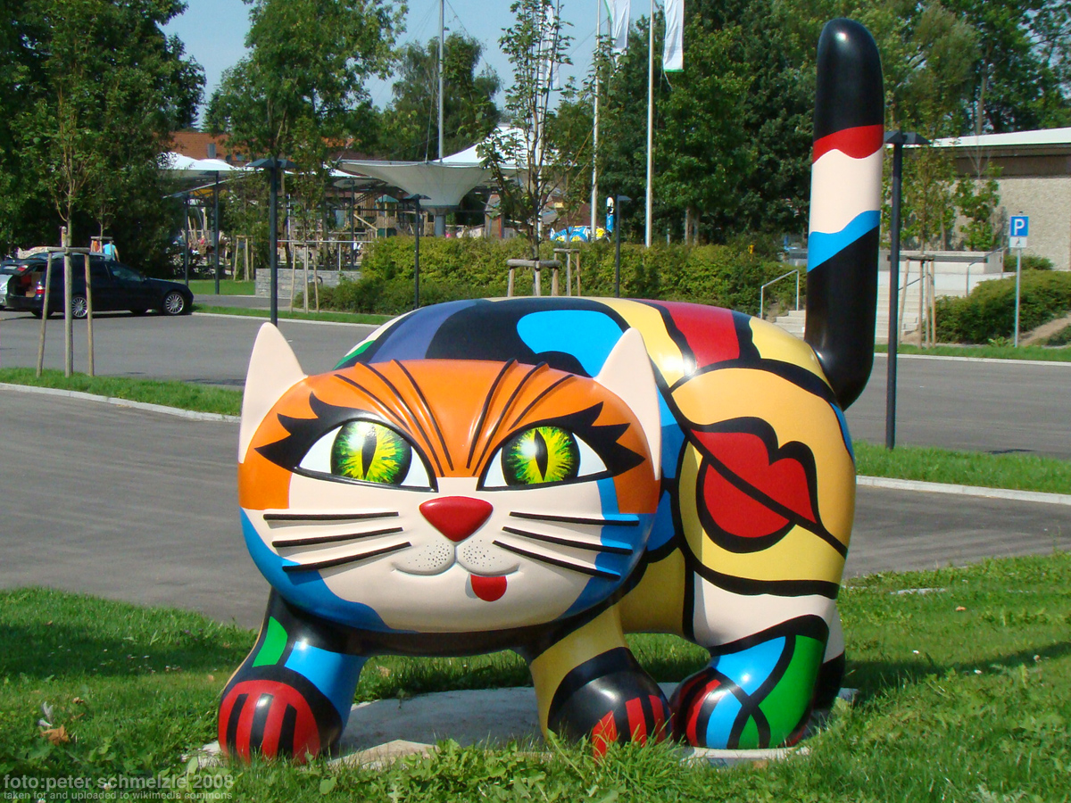 Kunst im öffentlichen Raum in Abstatt